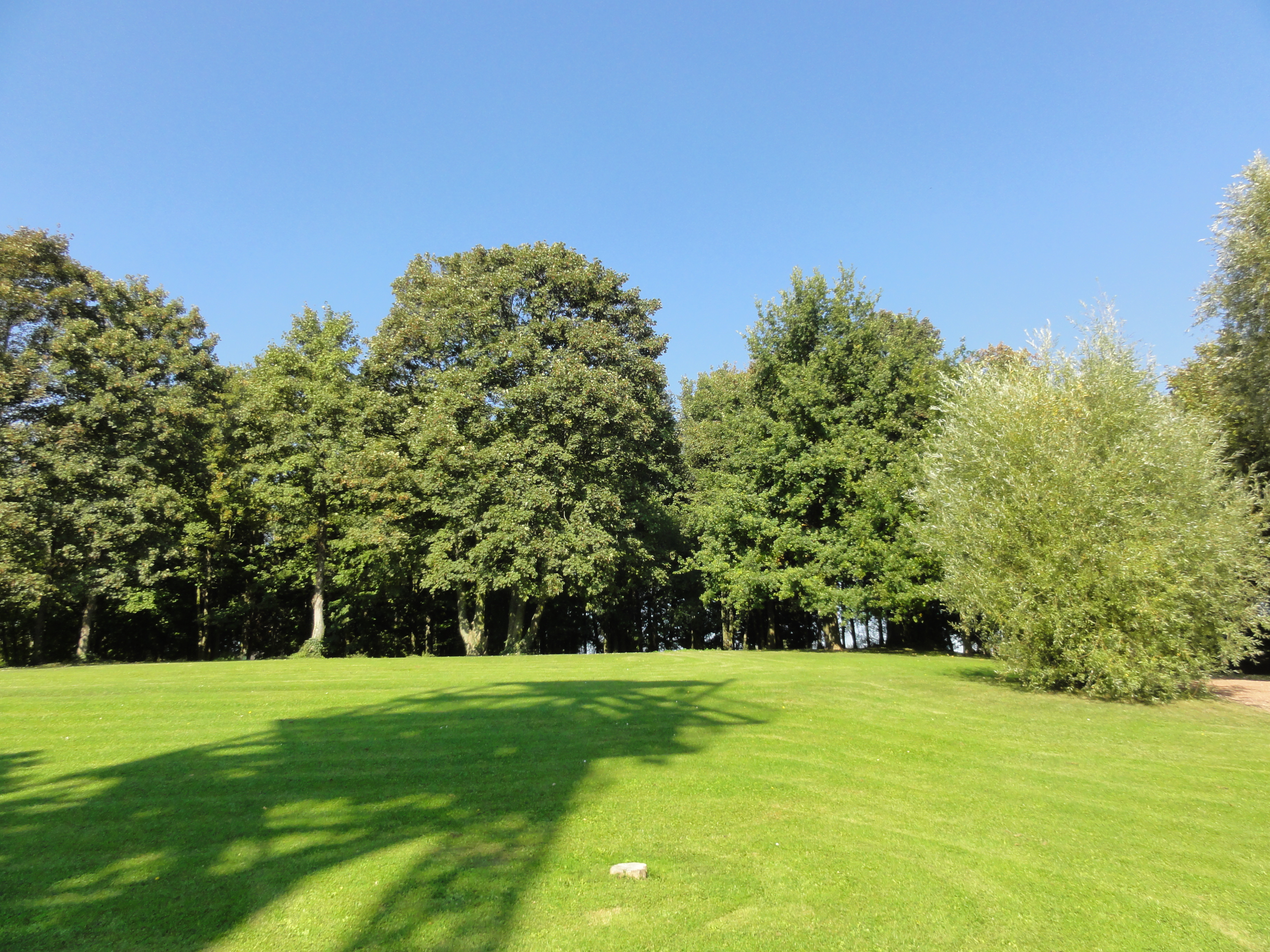 L'avaleresse n° 1 de la Compagnie des mines de Marles était un charbonnage non exploité du bassin minier du Nord-Pas-de-Calais constitué d'un seul puits situé à Marles-les-Mines, Pas-de-Calais, Nord-Pas-de-Calais, France.